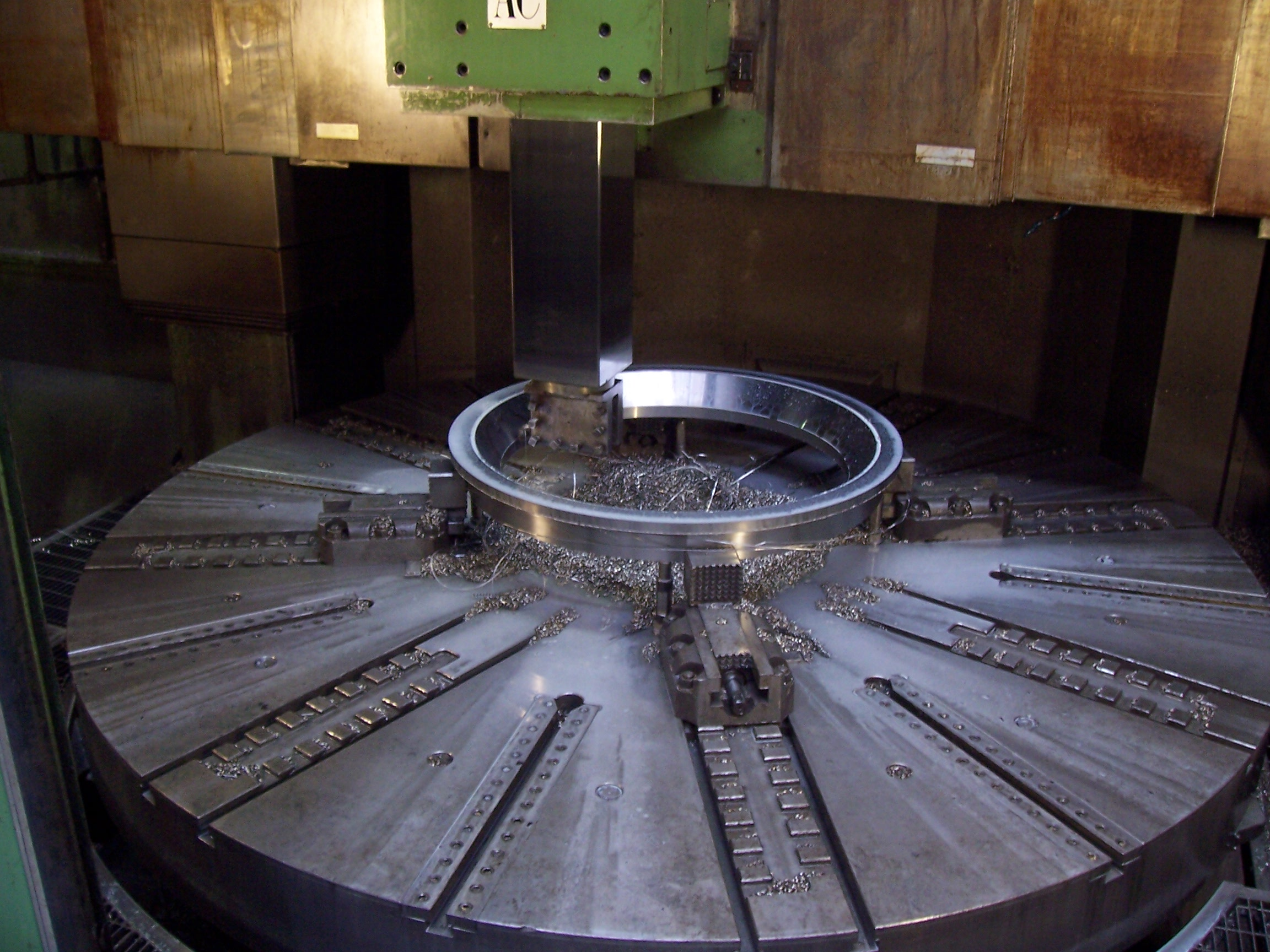 Токарно-карусельний_верстат_Pietro_Carnaghi: Токарно-карусельний_верстат_Pietro_Carnaghi